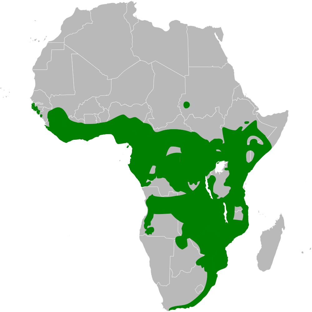 Phyllastrephus distribution map